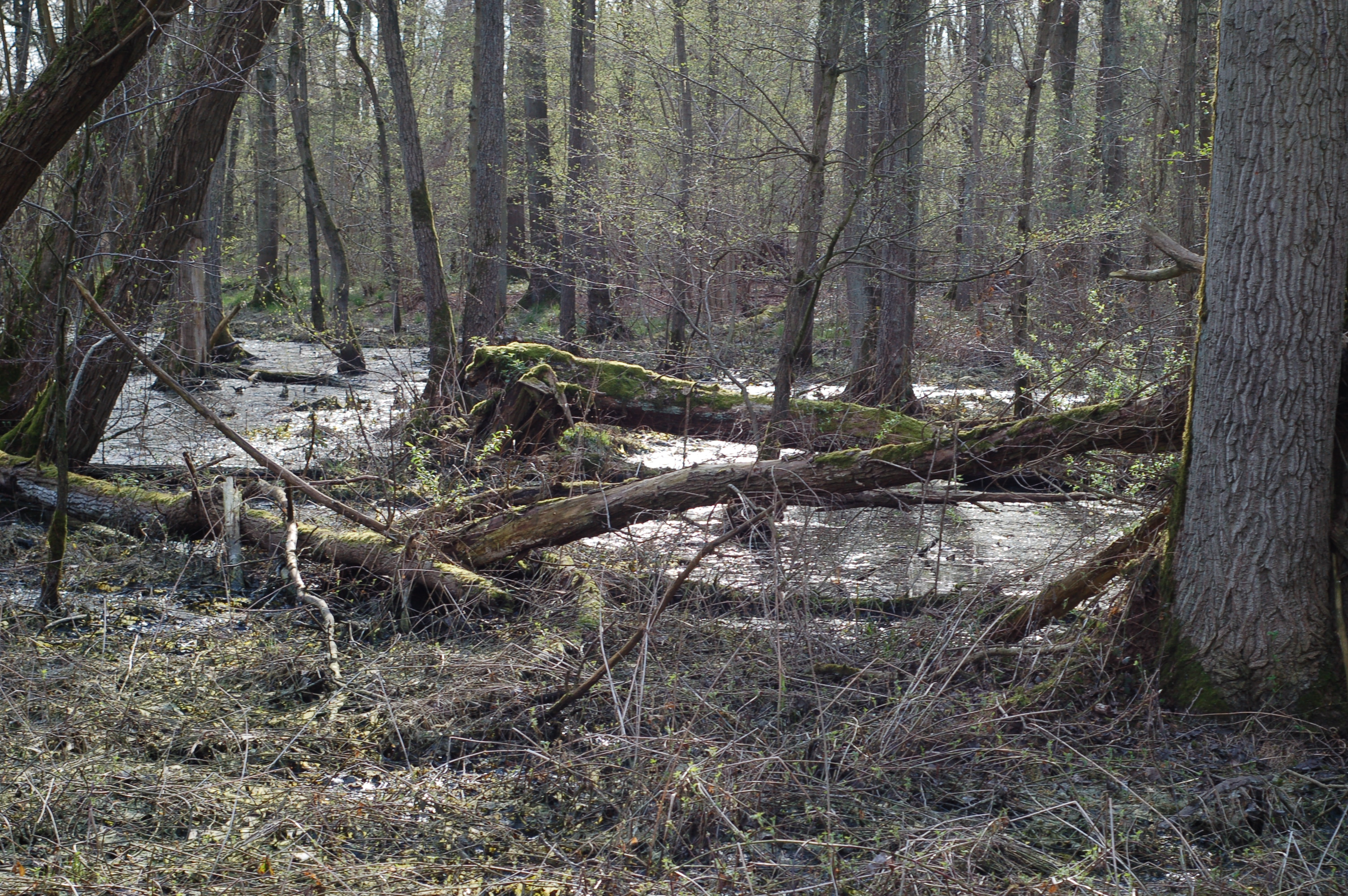 Bruchwald zwischen Waldfeucht-Haaren und Heinsberg-Karken, Nähe Kitschbach